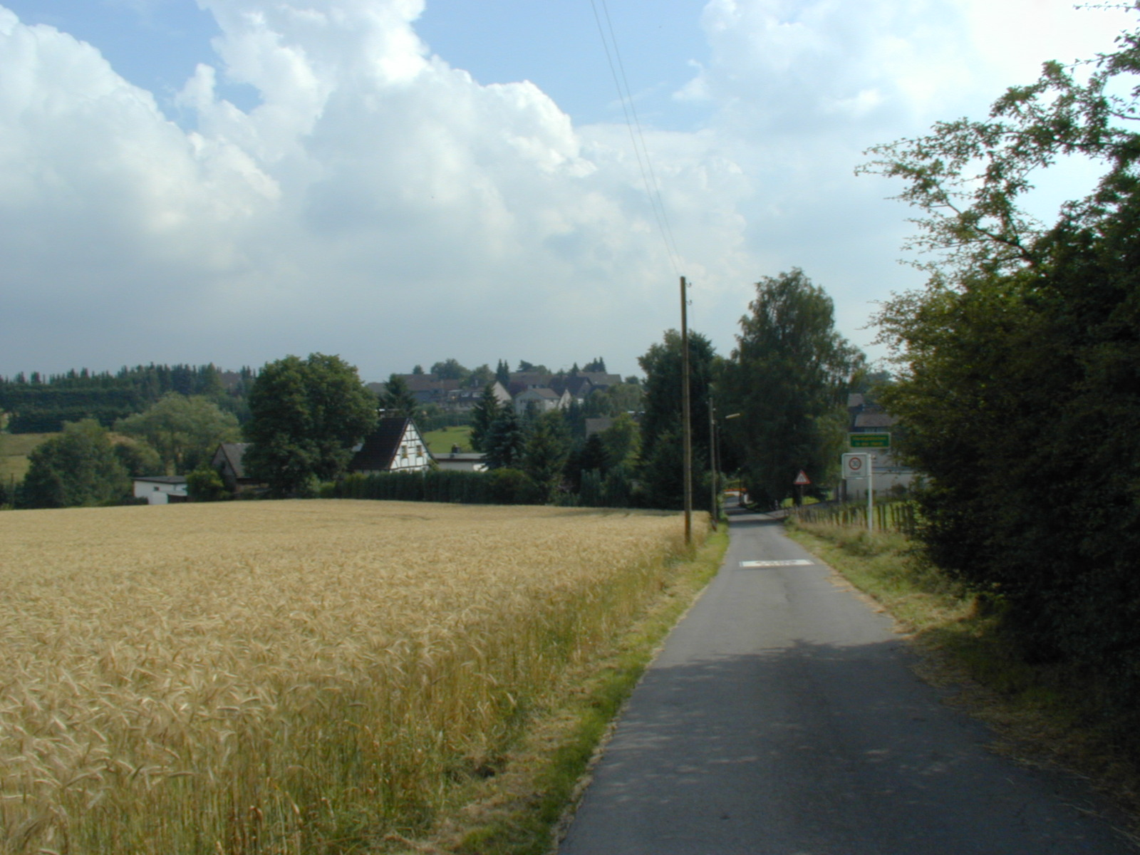 In der Hardt in Wuppertal